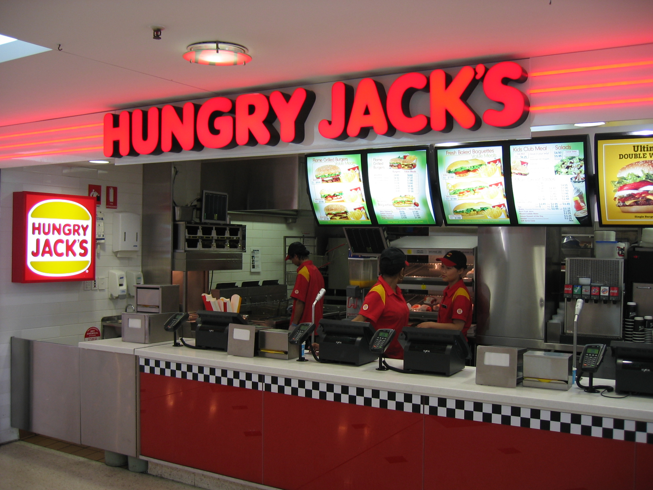 Picture of Hungry Jacks in Brisbane (Australia); Bild von Burger King Australia